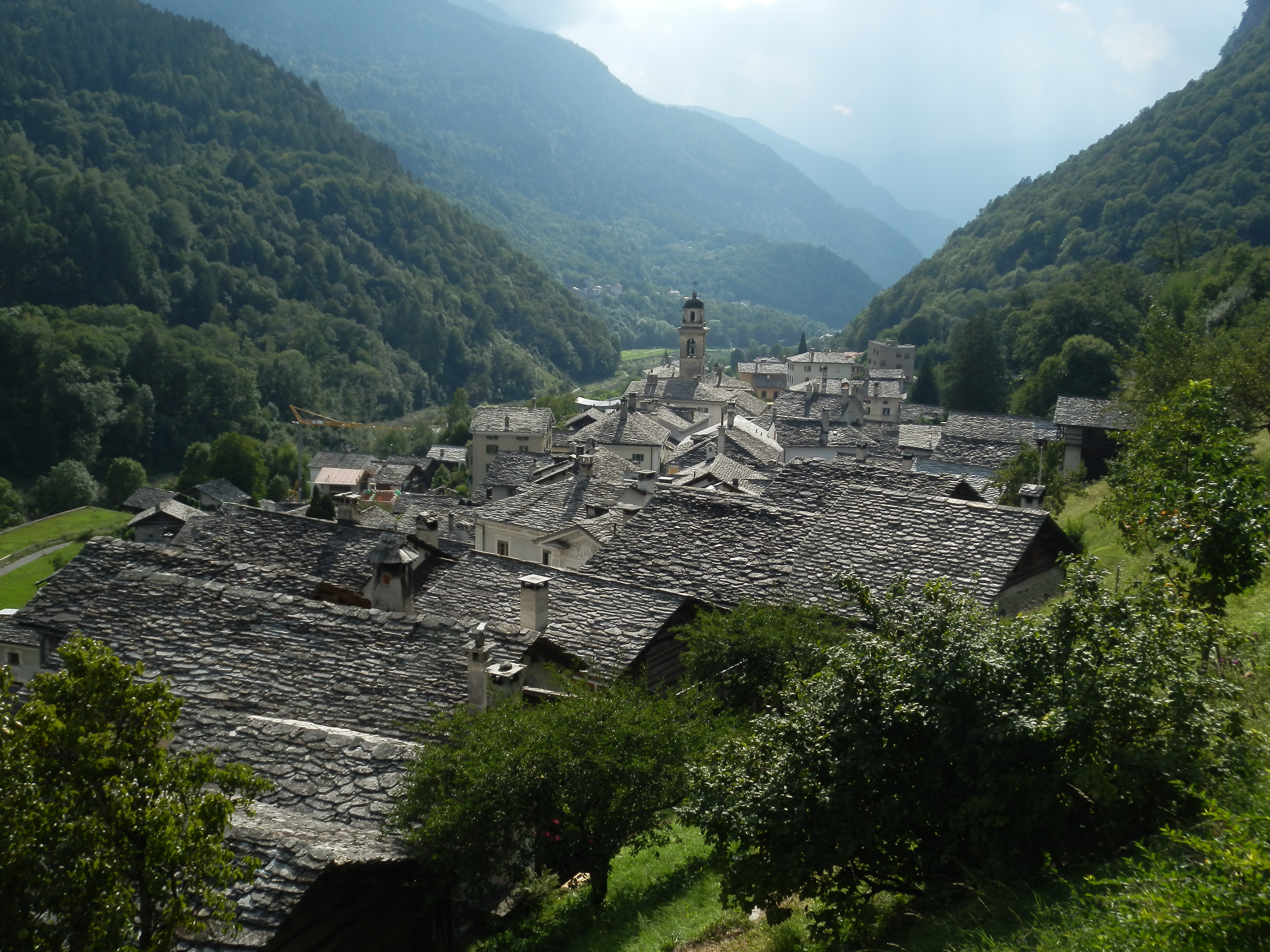 Visuale dall'alto del paesino di Castasegna.